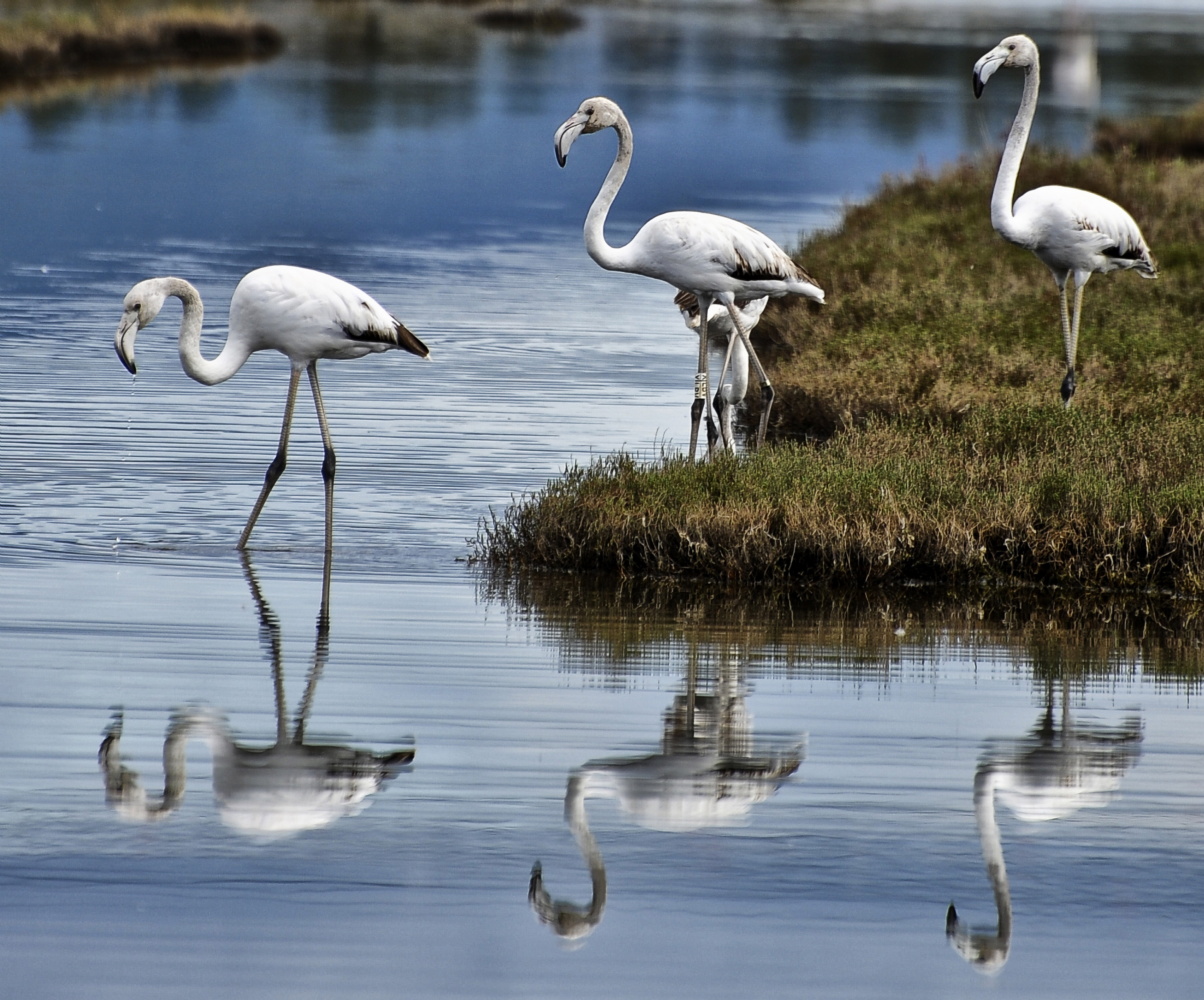 Padule Orti-Bottagone This is a photo of a monument which is part of cultural heritage of Italy. The authorisation for taking photos of this object was provided by the World Wide Fund for Nature Italy.